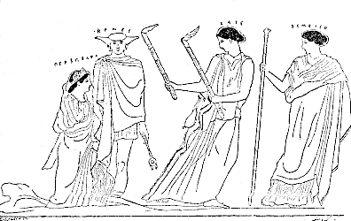 La scène de la montée, anodos, de Perséphone, retournant du royaume d'Hadès sur la terre, est figurée sur divers monuments. Les plus intéressants sont les vases peints. Sur le plus anciennement connu on voit Perséphone (Persôphata) sortant de terre et saluant la lumière. Près d'elle se tient Hermès (Êrmes) ; devant elle Hécate (Êkate) portant deux torches ; à droite Déméter (Demeter). On connaît maintenant deux autres peintures de vases attiques qui représentent certainement le même sujet. C'est d'abord un vase de Dresde, où l'on voit Perséphone (Pherophatta) dont le corps émerge aux trois quarts du sol, Hermès tenant le bâton du conducteur d'âmes, et trois Silènes dansants.